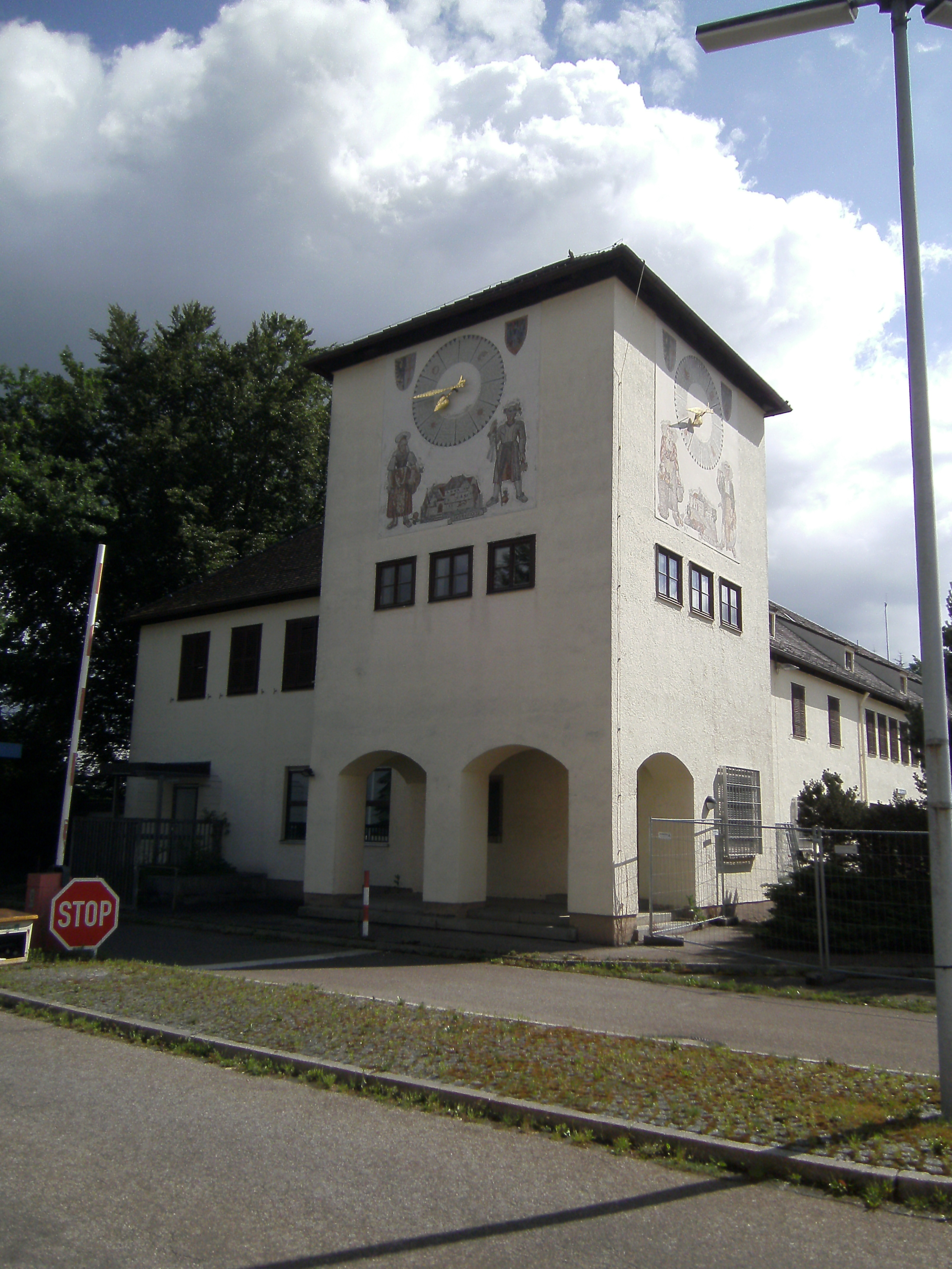 Fliegerhorst Memmingerberg - Hauptwache und Kommandantur